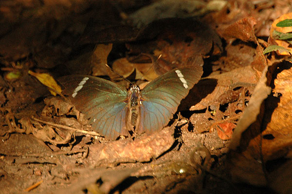 Uganda Kanyo Pabidi Res, Masindi, Uganda